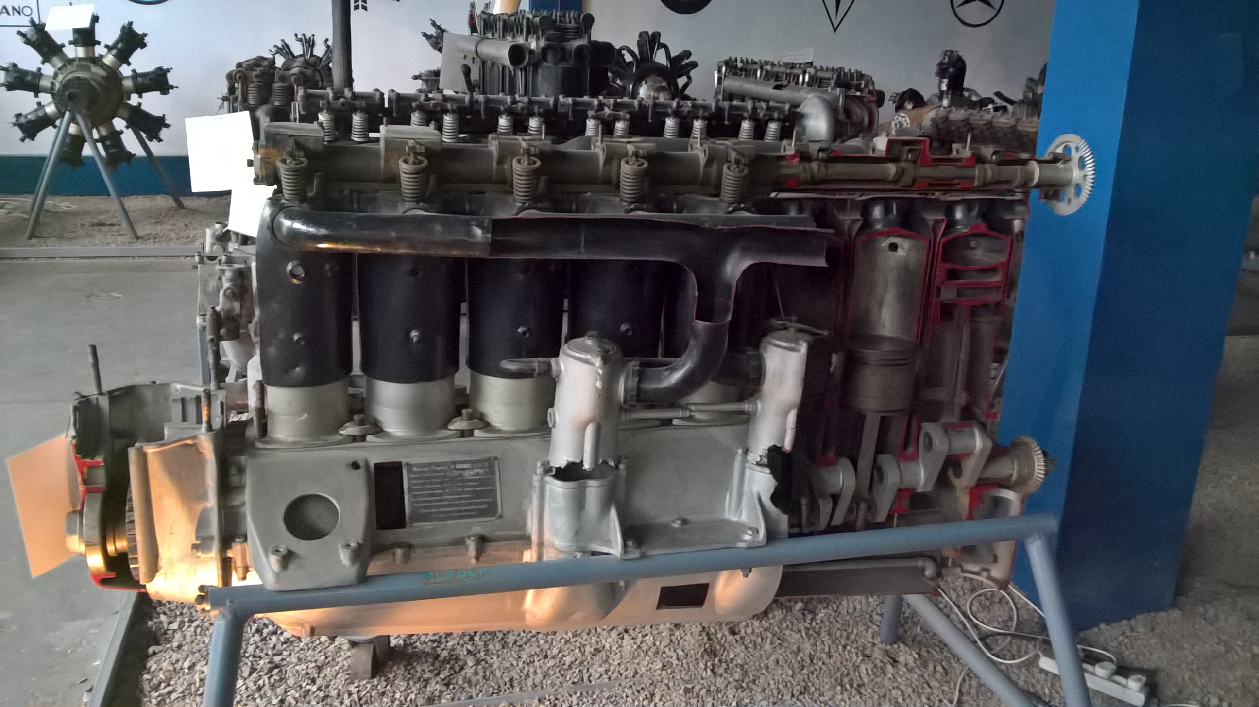 Niemiecki 8-cylindrowy silnik rzędowy Mercedes D.IVh z 1915 r., eksponowany w Muzeum Lotnictwa Polskiego w Krakowie.